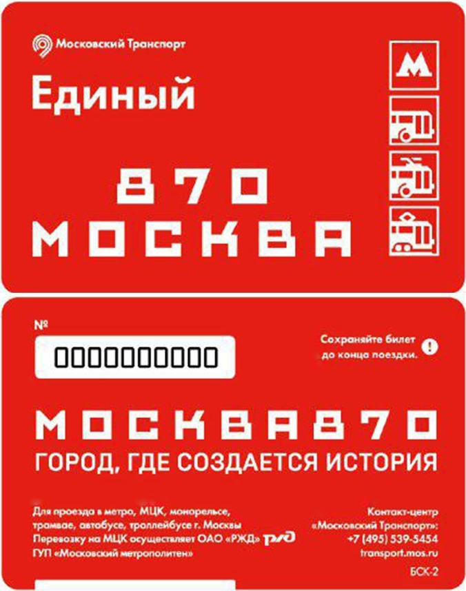 Единый билет Московского городского транспорта, выпущенный на 870-летие Москвы